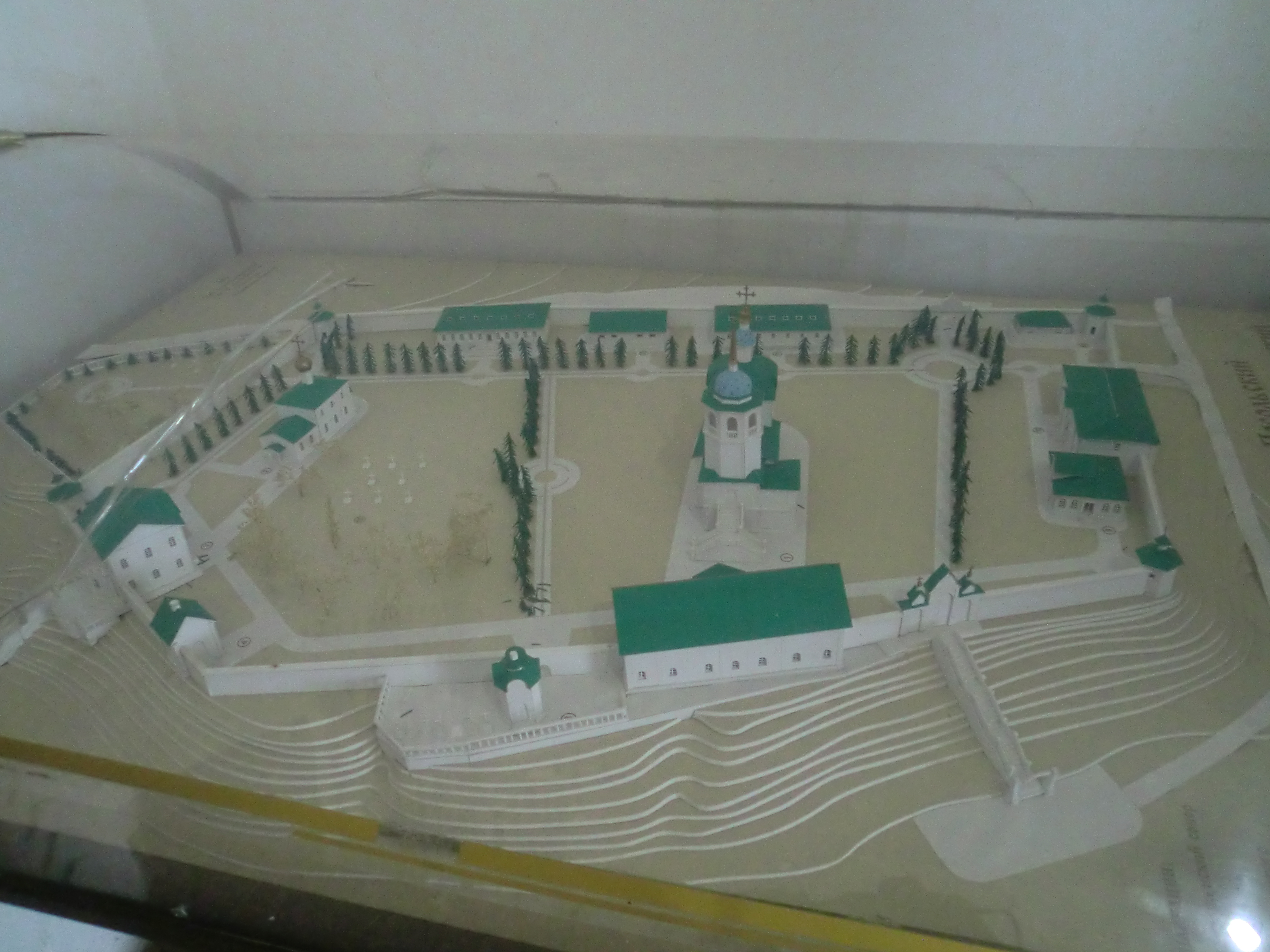 Монастырь Спасо-Преображенский Посольский (Республика Бурятия, Бабушкин, село Посольское)